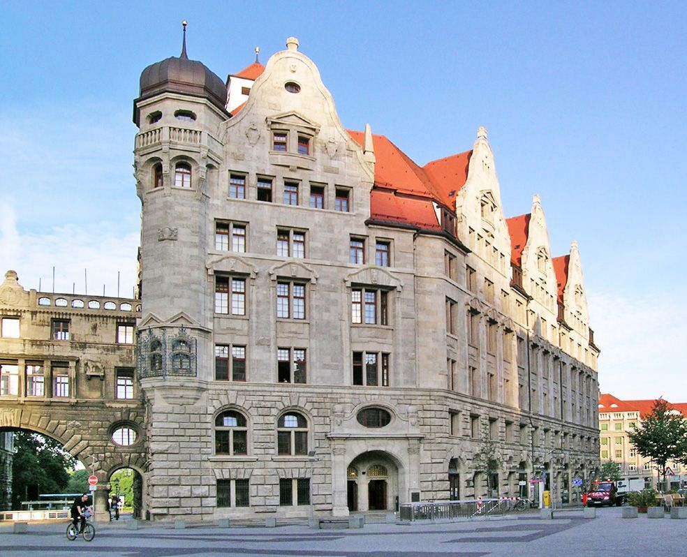 Stadthaus, Leipzig, Germany.